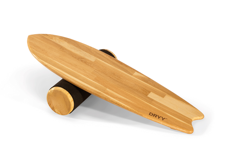 Balance Board der Marke DRYY®, Modell "The Fish", Eiche